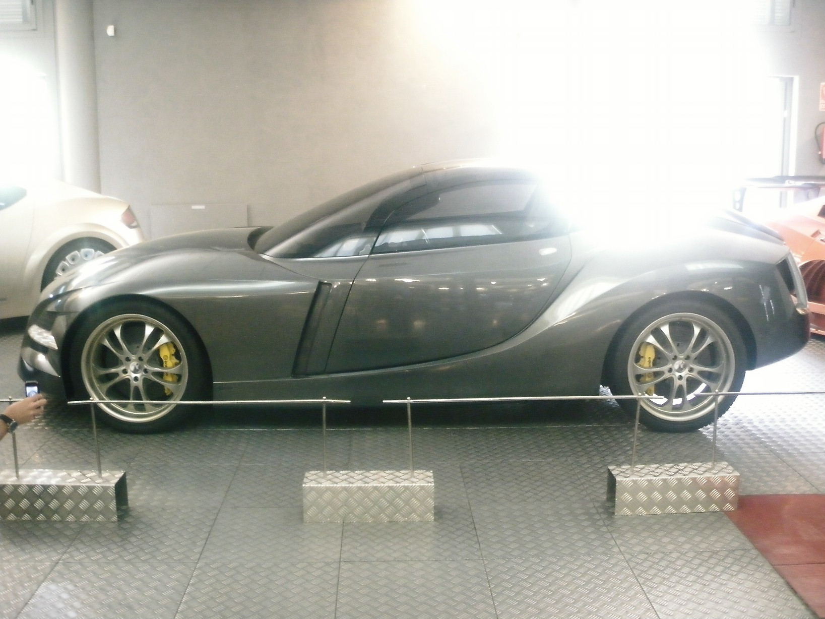 Prototipo de Fiat